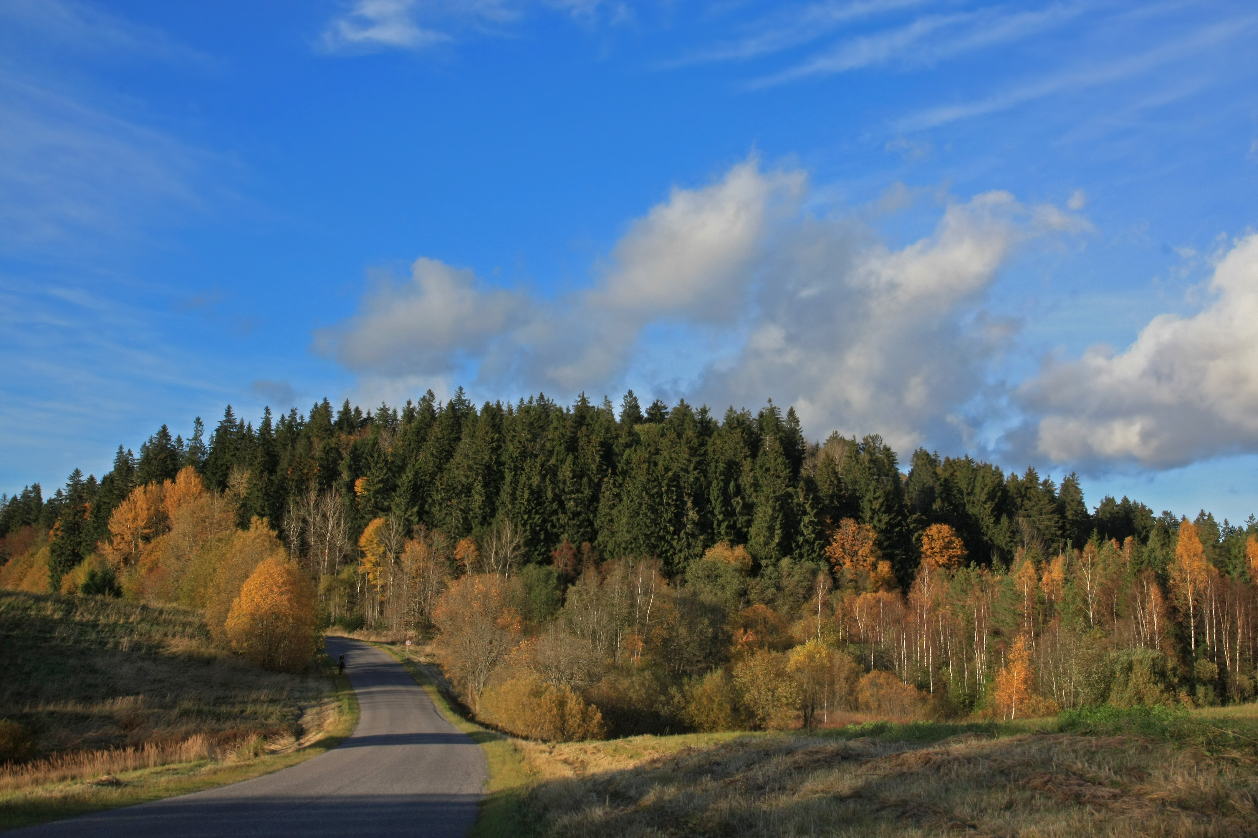 Suur Munamägi Haanja kõrgustikul